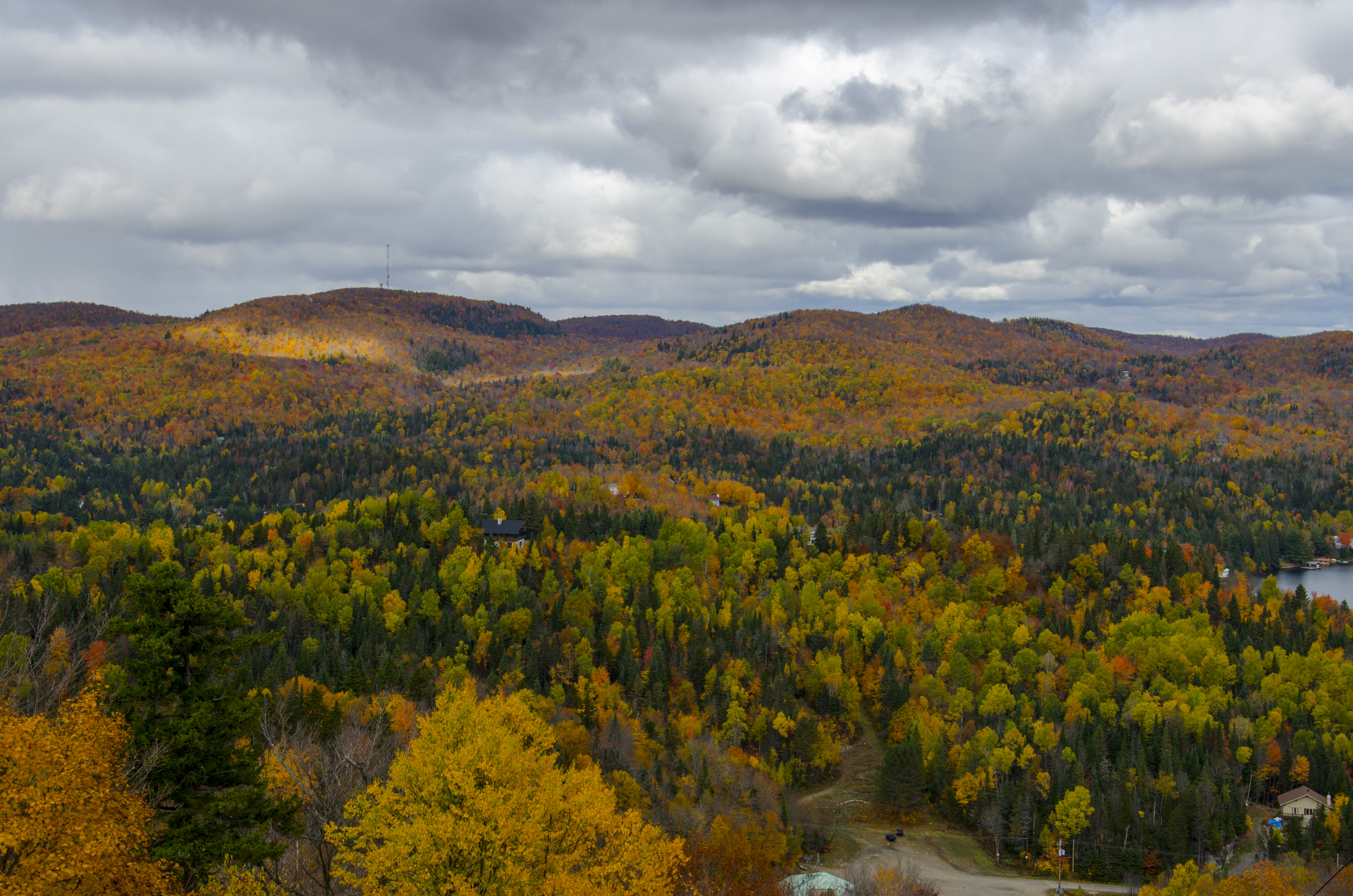 L'automne au Québec